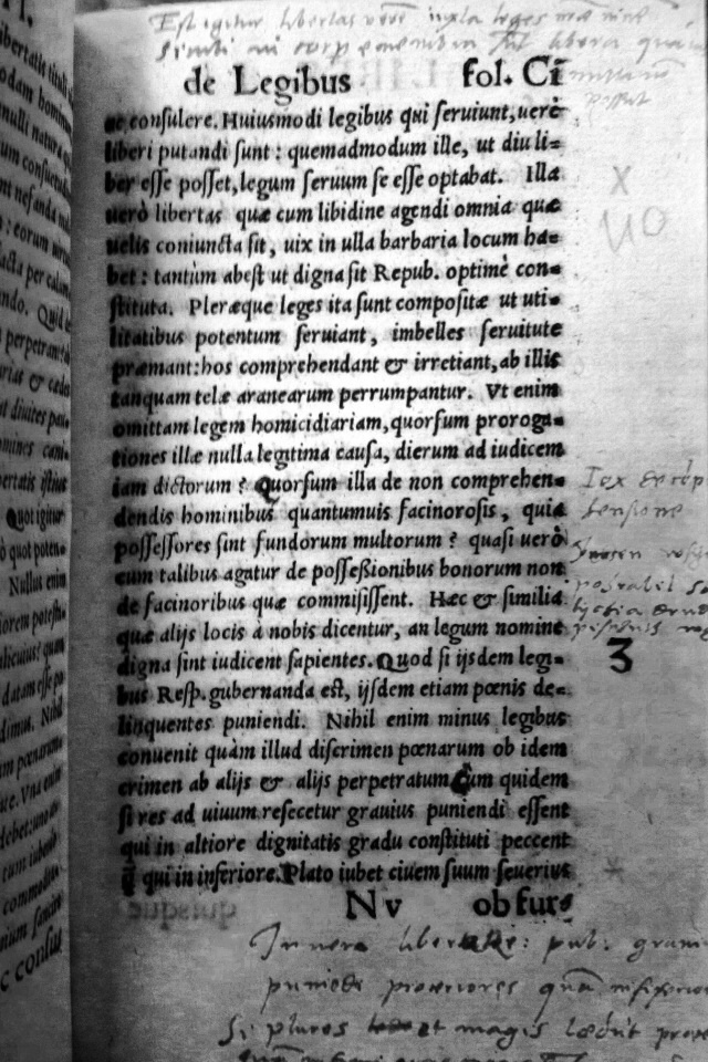 De Republica Emendanda 1551 .... marginalia księgi de Legibus